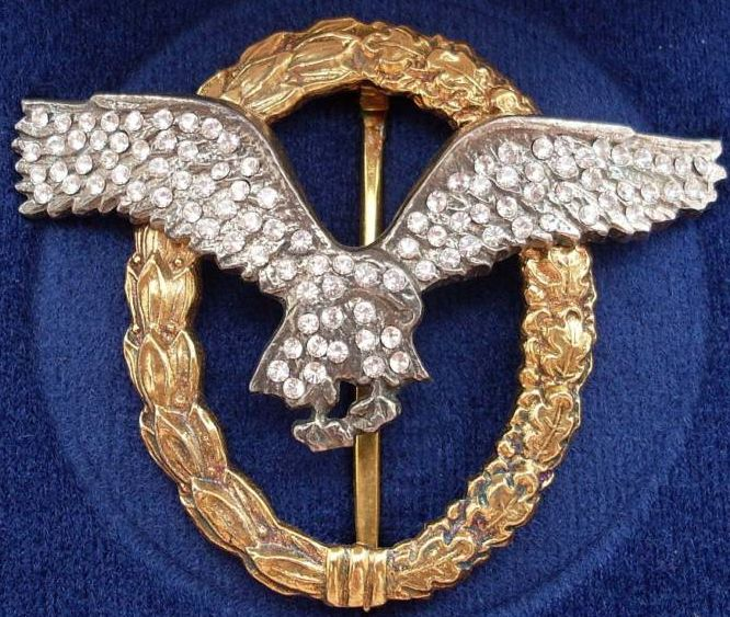 Doppelabzeichen der Deutschen Luftwaffe mit Brillanten 57er Version